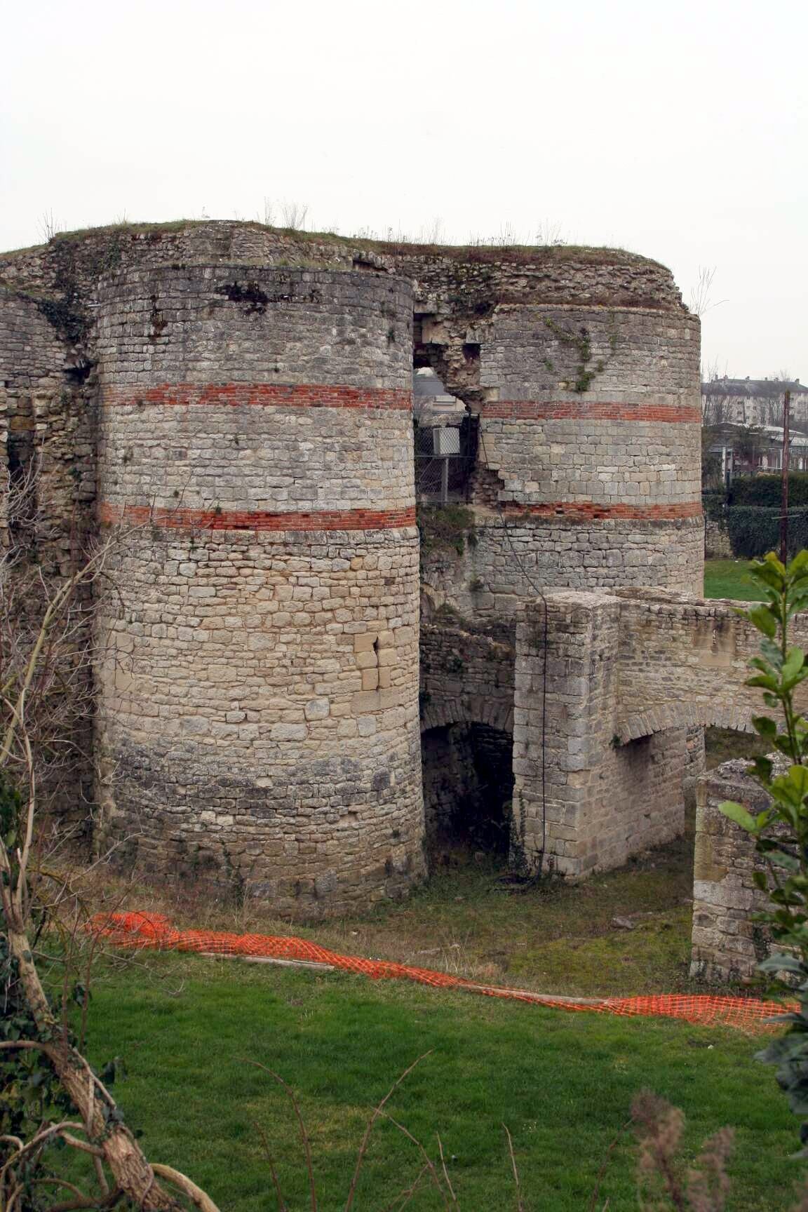 Château de Beynes, entrée côté ouest - Yvelines (France)